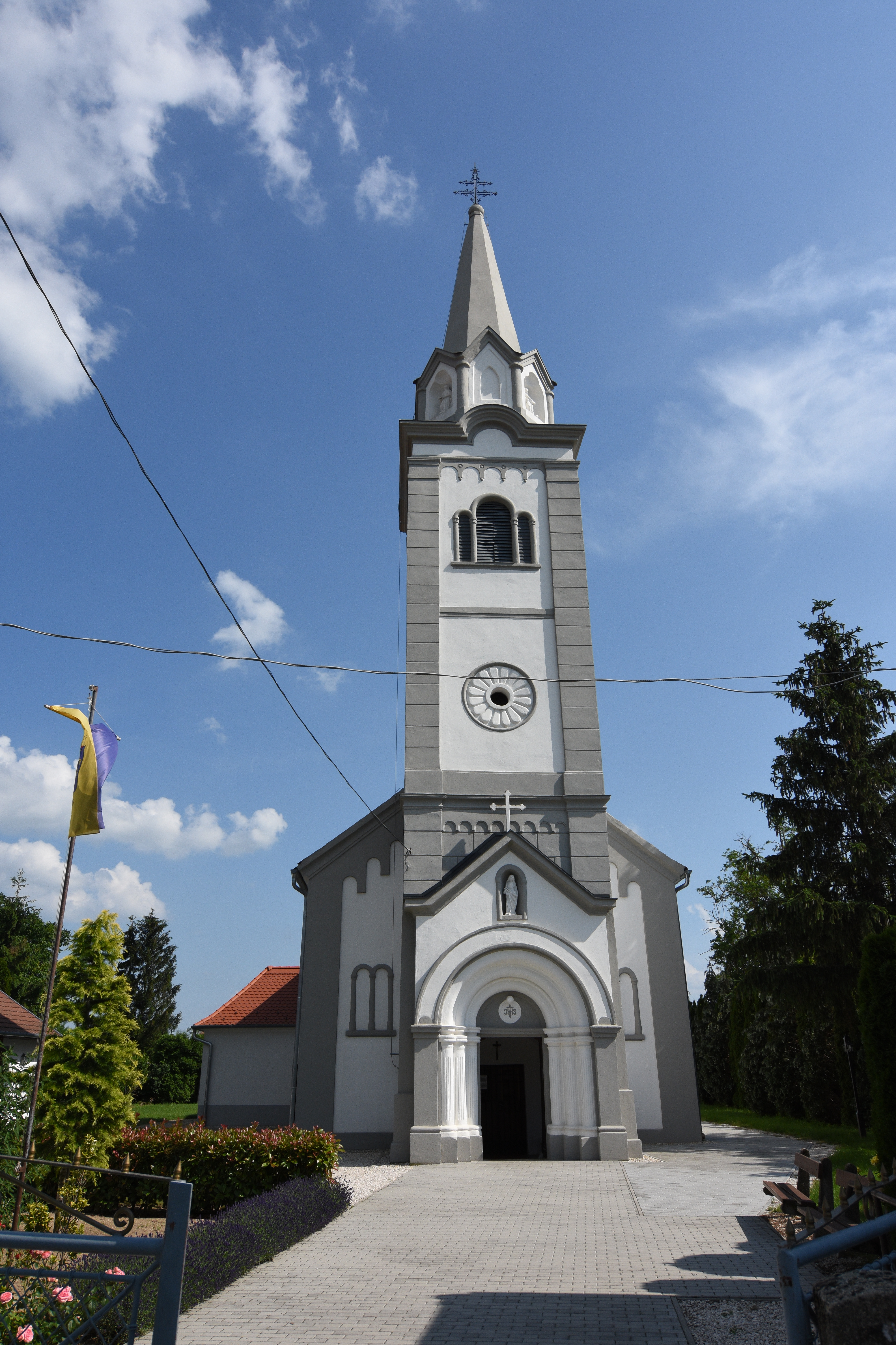 Church of the Nativity of the Virgin Mary in Lócs